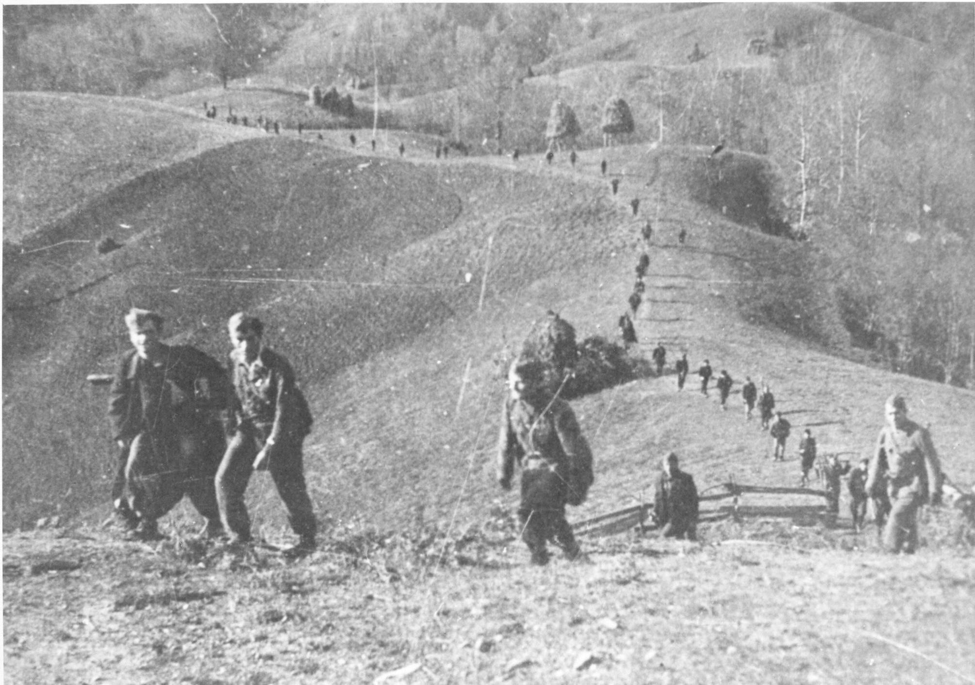 Srpskohrvatski / српскохрватски: Borci 17. istočnobosanske divizije u maršu 1944. godine.